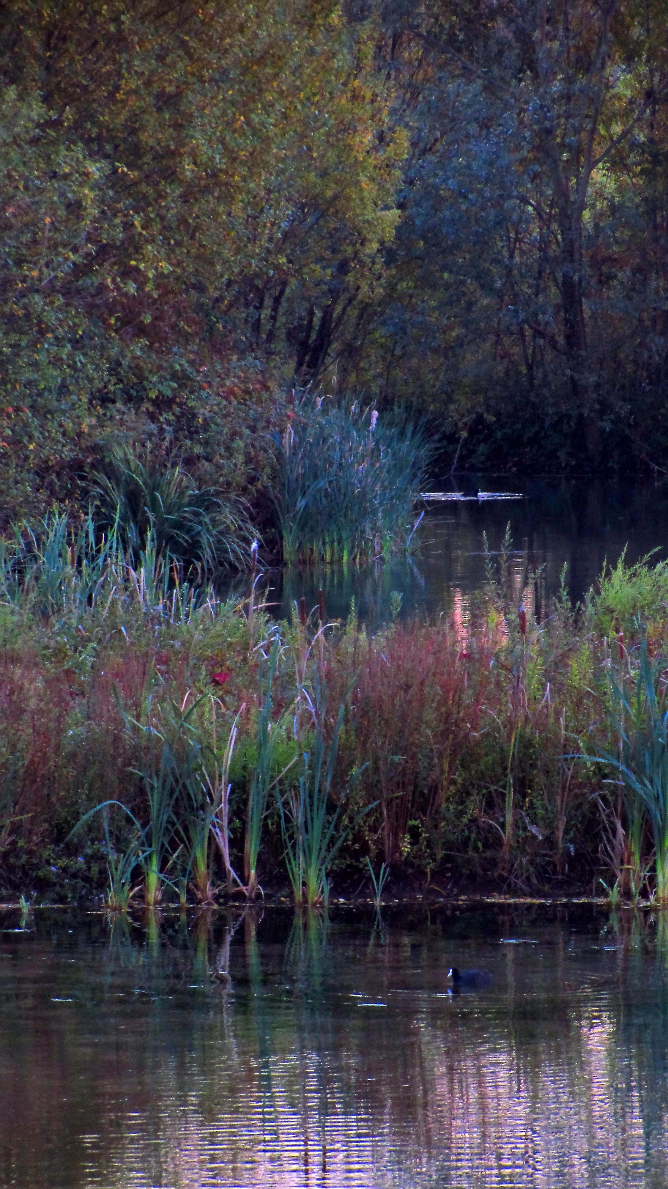 Oasi Lipu - Centro "Alex Langer" This is a photo of a monument which is part of cultural heritage of Italy.